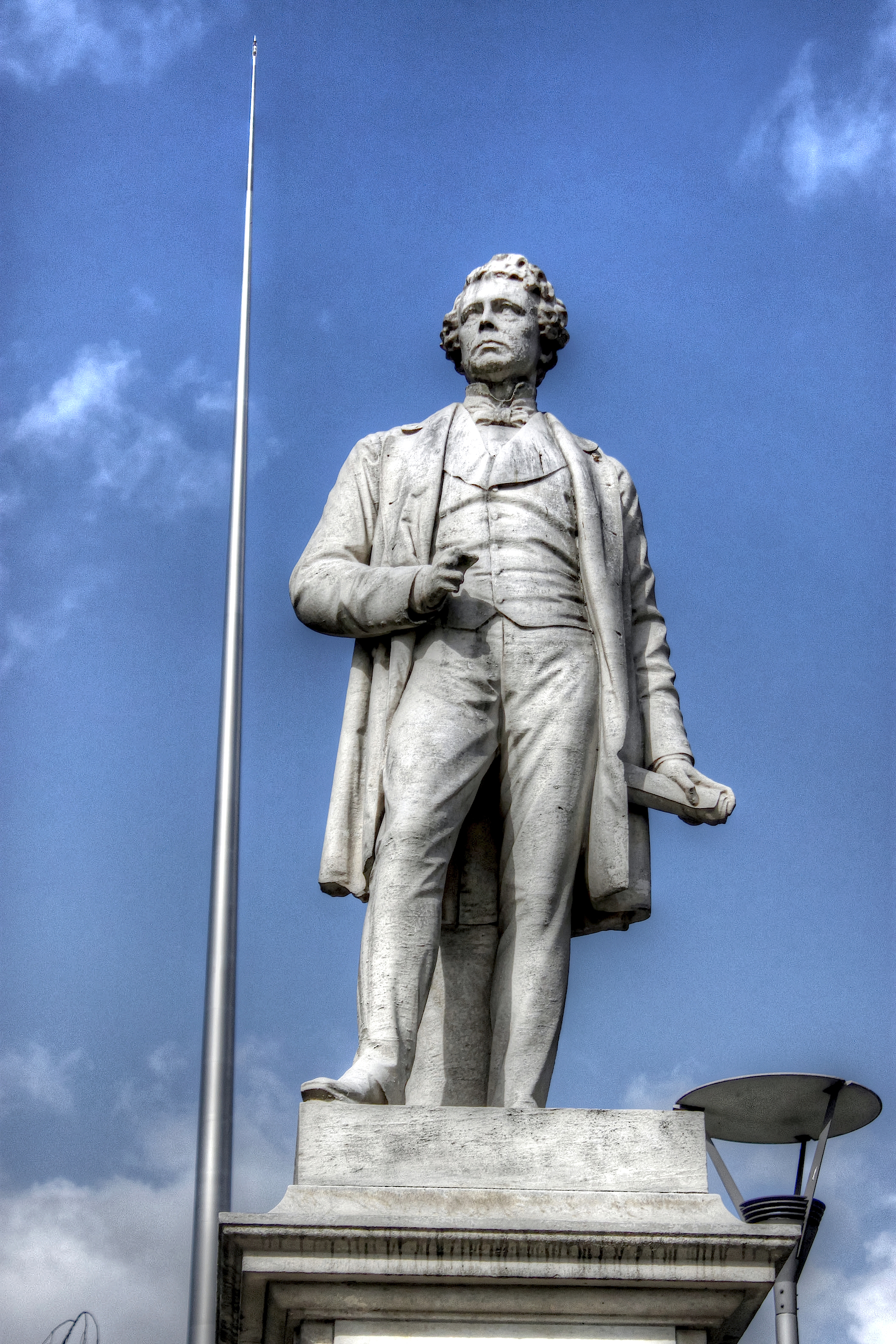 millenium spire